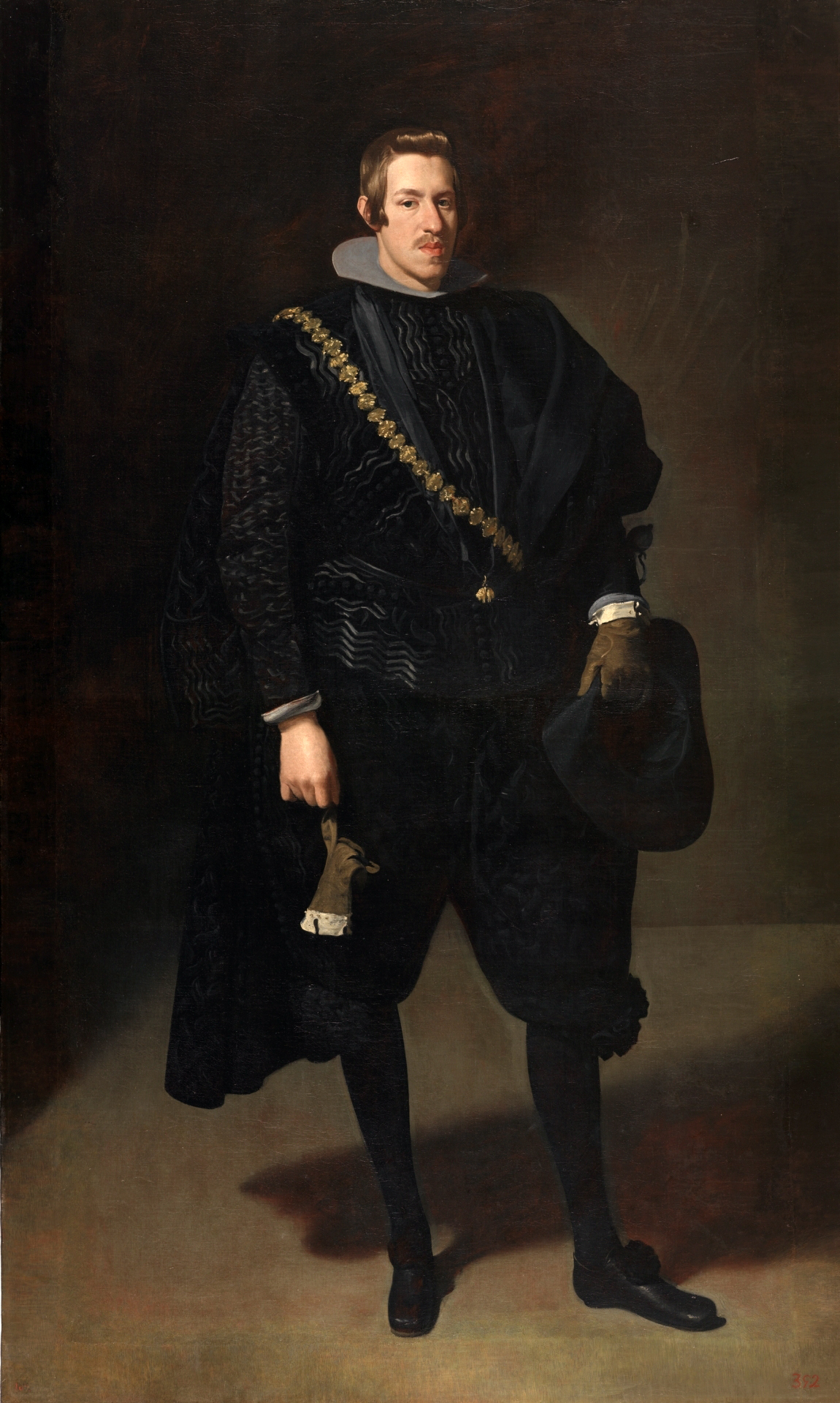 Retrato del infante Carlos de Austria (1607-1632), que fue hijo del rey Felipe III de España y de la reina Margarita de Austria.